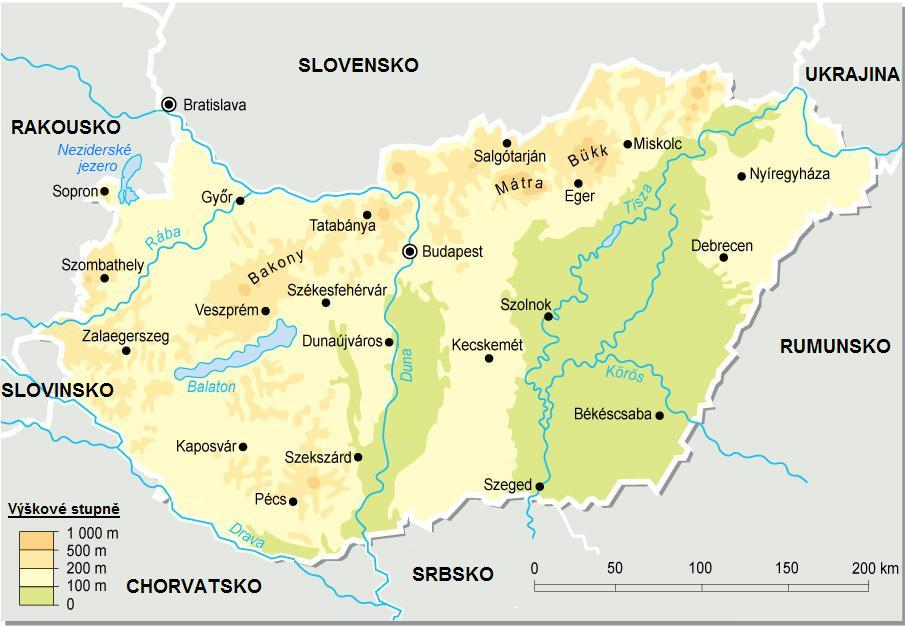 Fyzická mapa Maďarska.